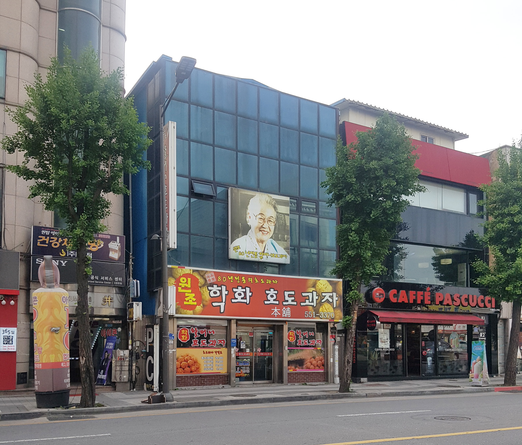 원조 학화 호도과자